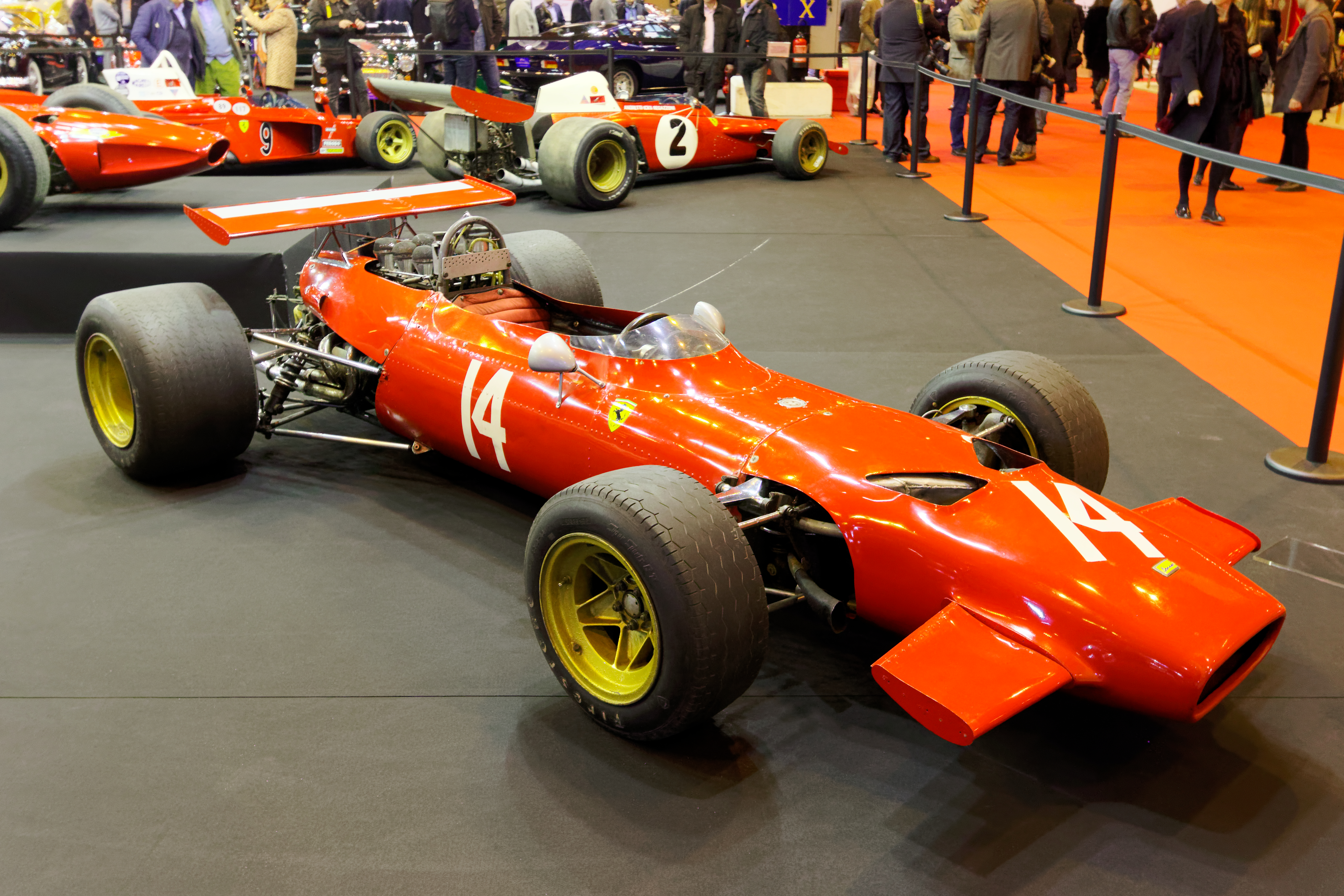 Une Ferrari 246 Tasman de 1967 exposée lors du salon Rétromobile 2017.